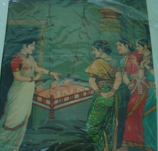 Raja Ravi Varma Lithographs Original